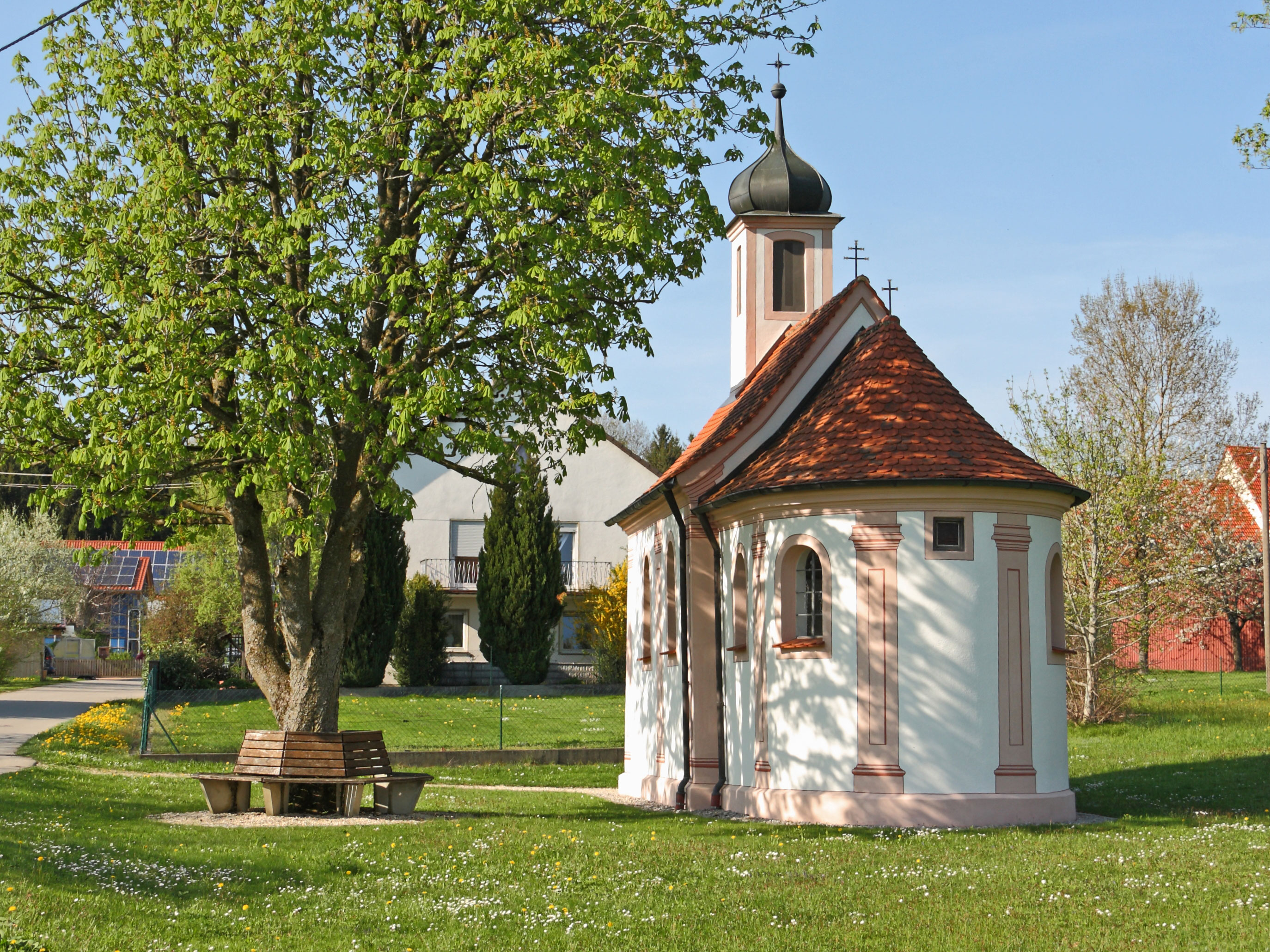 Kapelle zu Unseres Herren Ruh in Reichertsried; Ansicht der Mitte des 18. Jh. erbauten Kapelle von Süddwesten